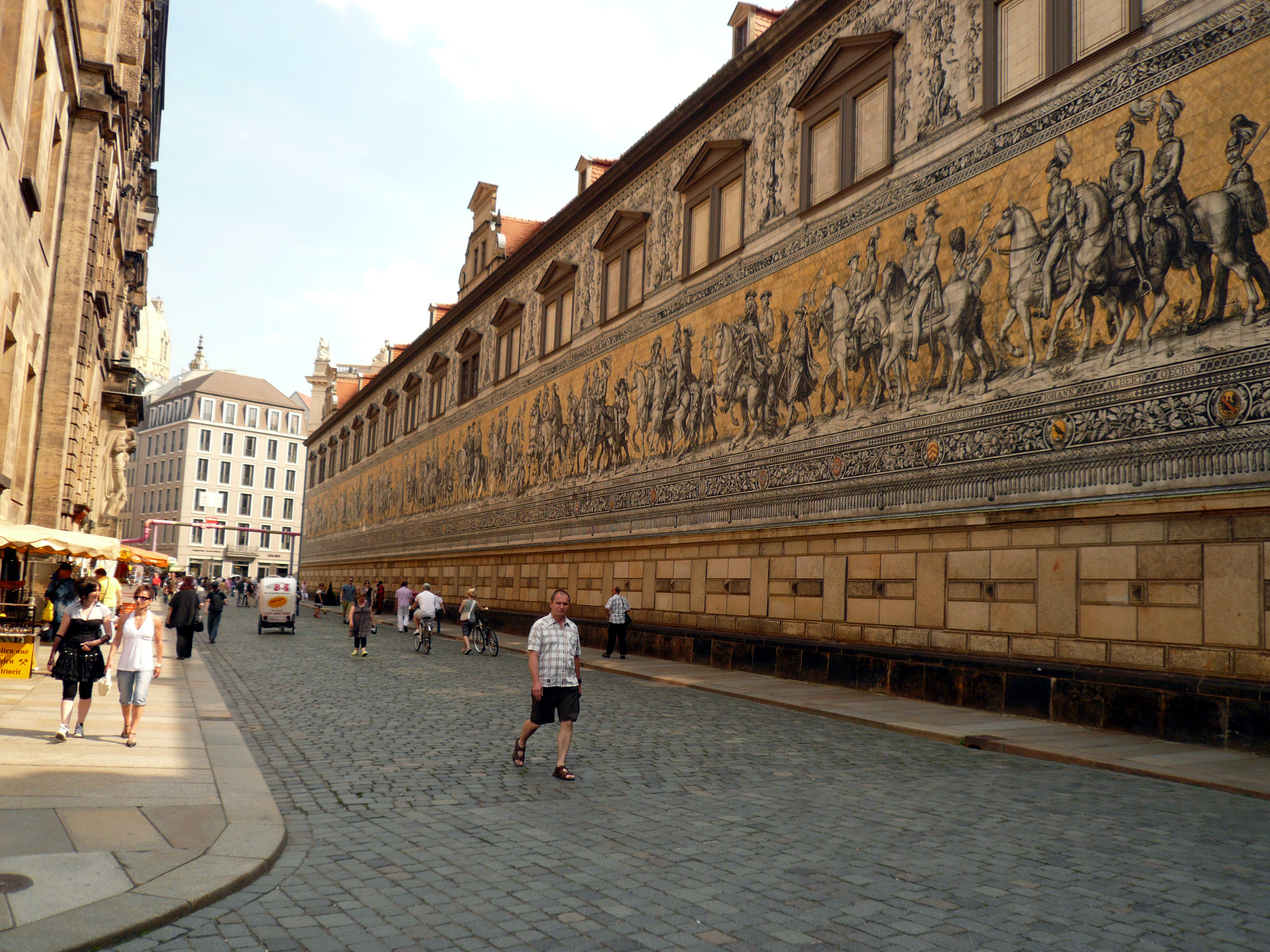 Der „Fürstenzug“ in der Dresdner Altstadt.